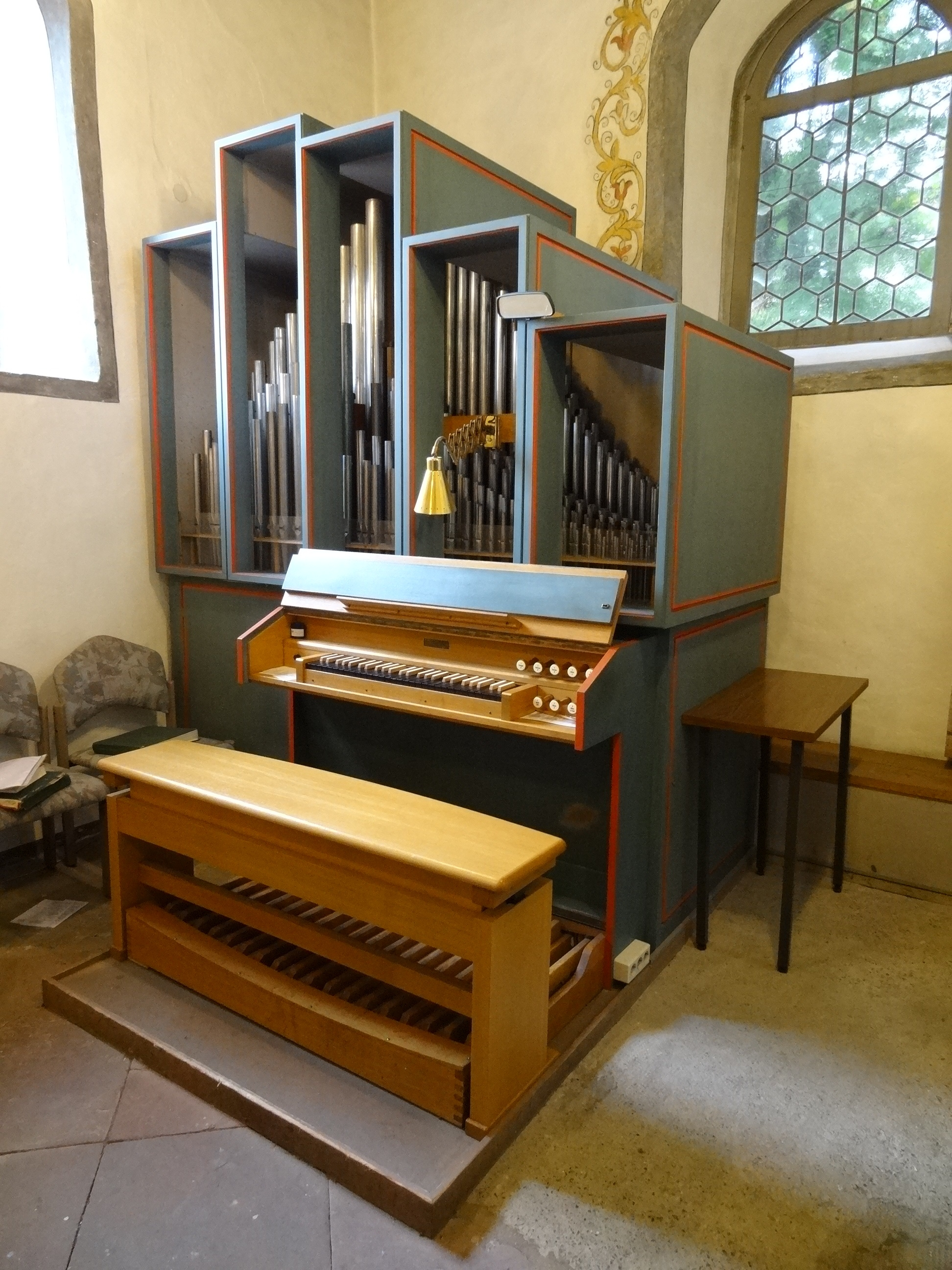 Evangelische Kirche Garbenteich